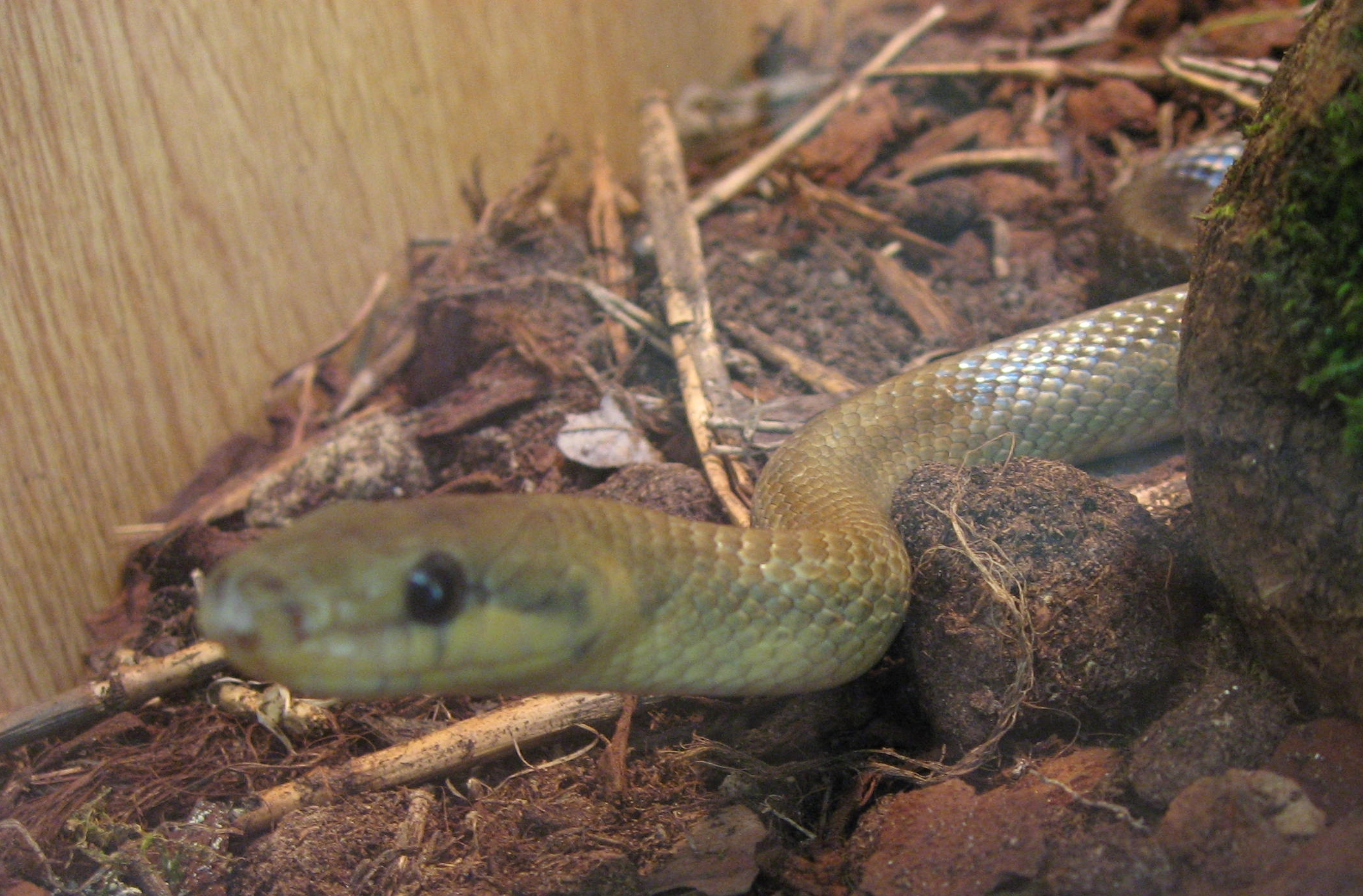 Zamenis longissimus in Zoodyssée